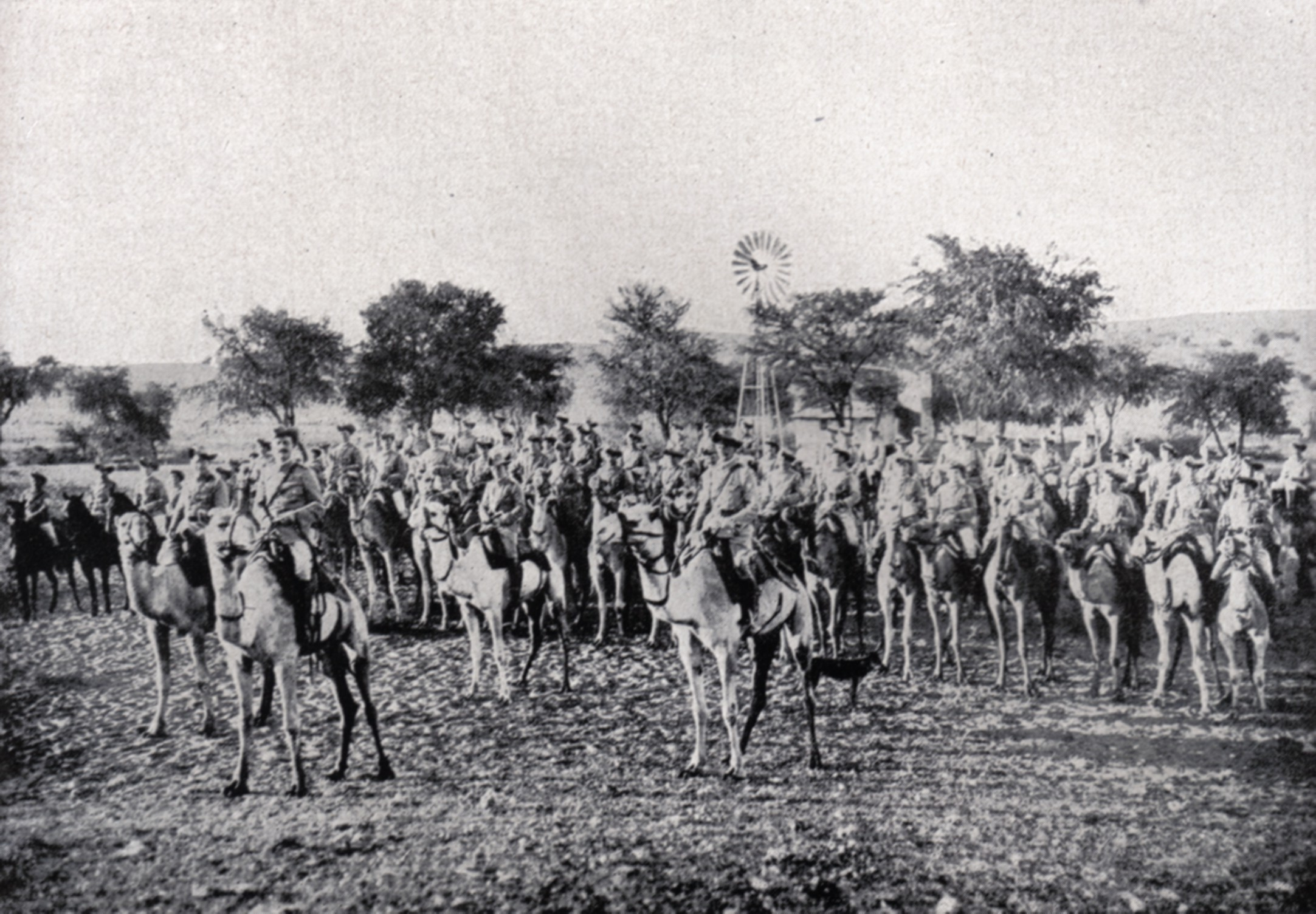 Kamelreiter Kompanie der deutschen Schutztruppe in Deutsch-Südwestafrika 1904/1905